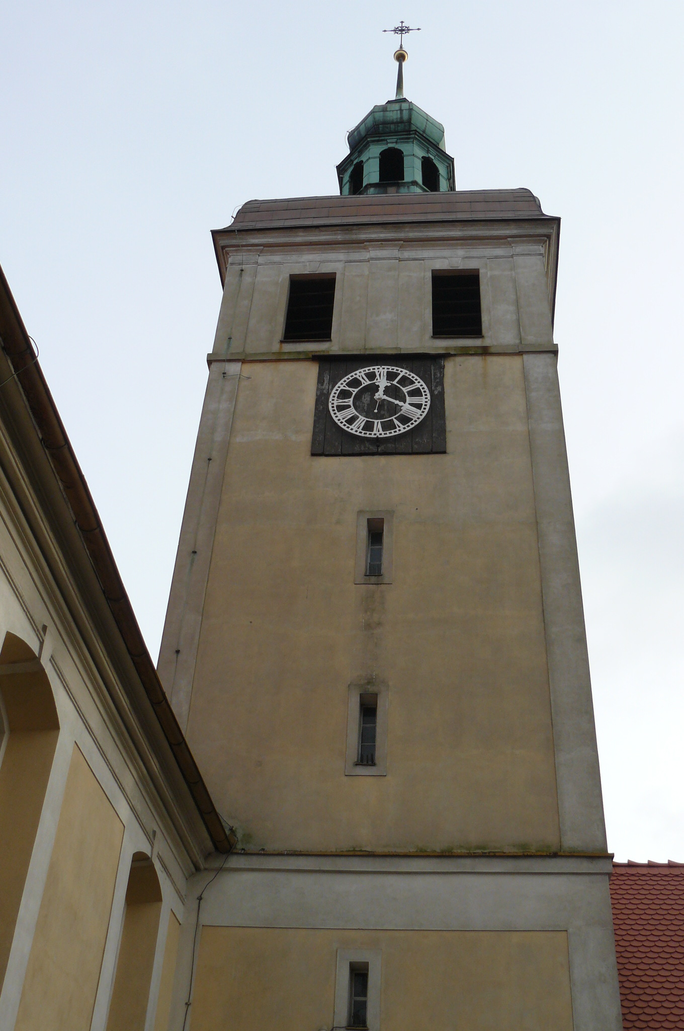 Nowe Skalmierzyce - kościół MB Nieustającej Pomocy.